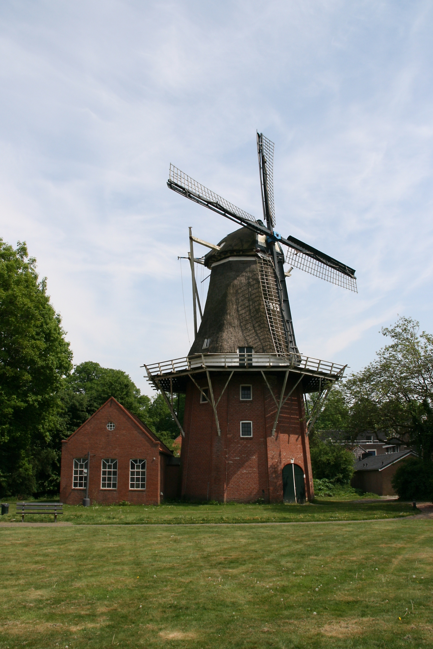 Gieten: Molen Hazewind